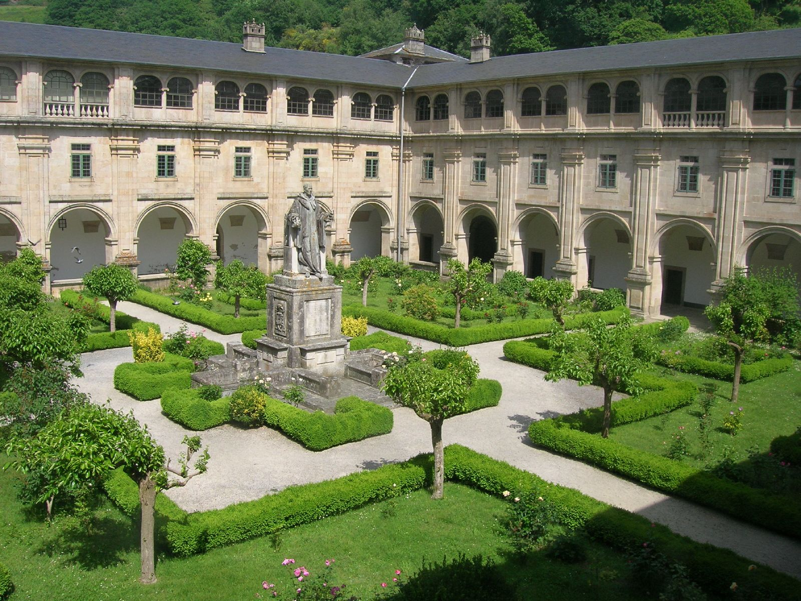 Mosteiro de San Xulián de Samos, Galiza'Mosteiro de San Xulián de Samos'